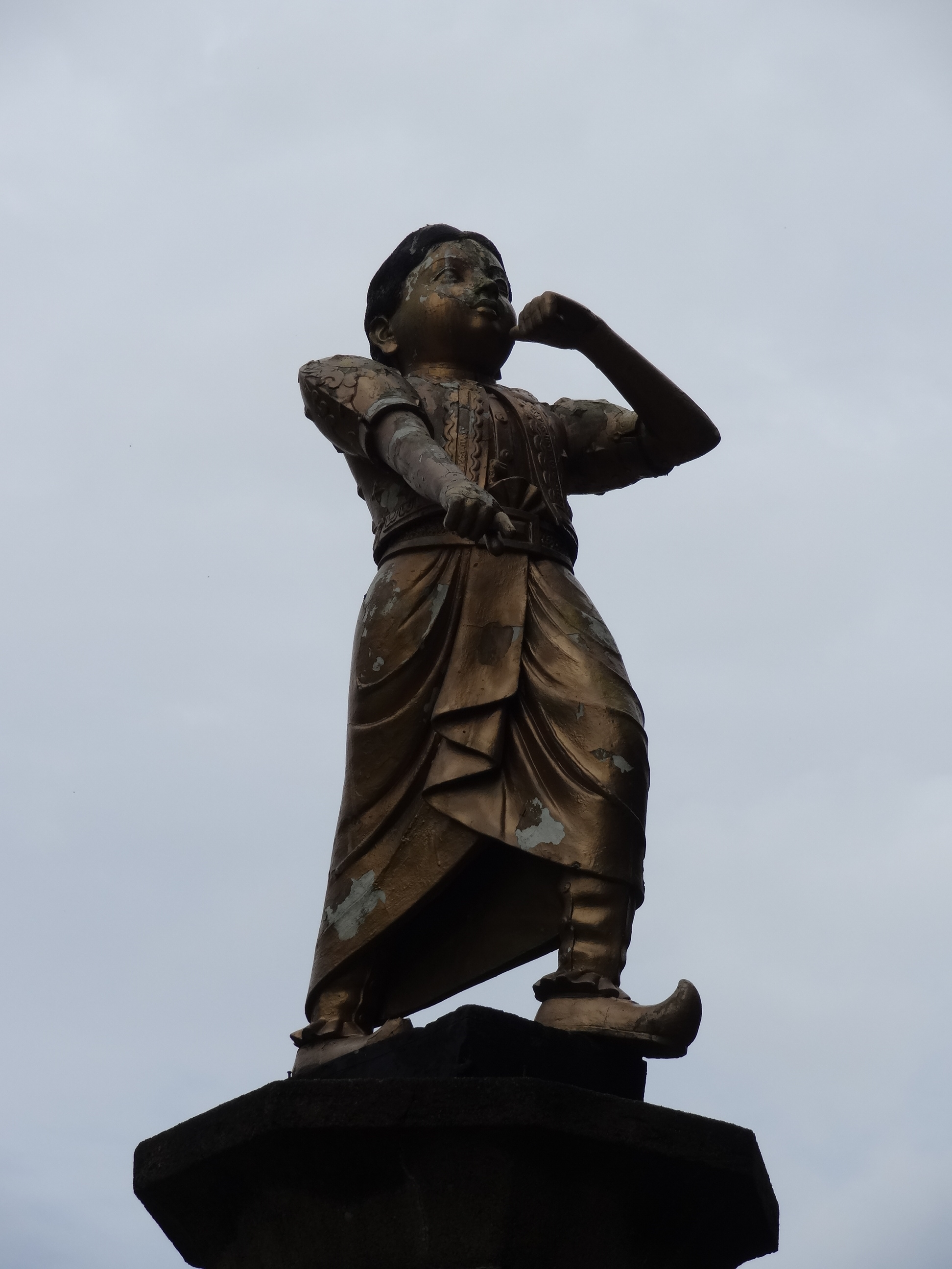 Madduma Bandara statue Kandy